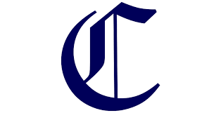 Logo del Collecchio Baseball